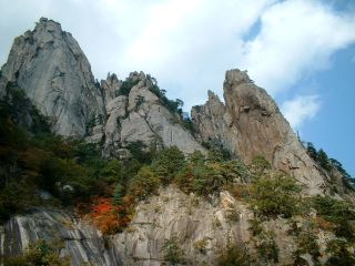 Seoraksan, South Korea